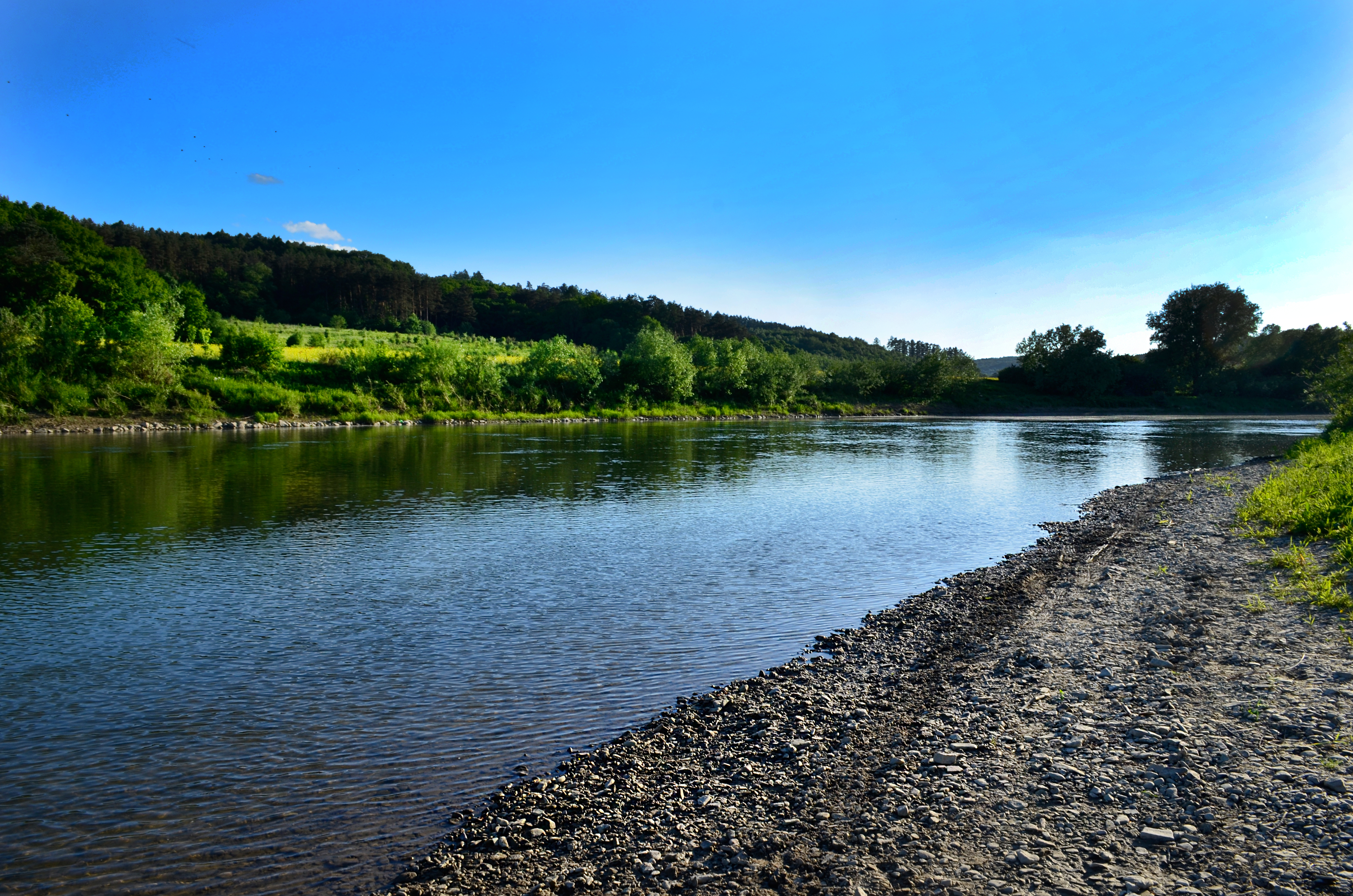 ріка Сян у Вапівцях: ріка Сян у Вапівцях